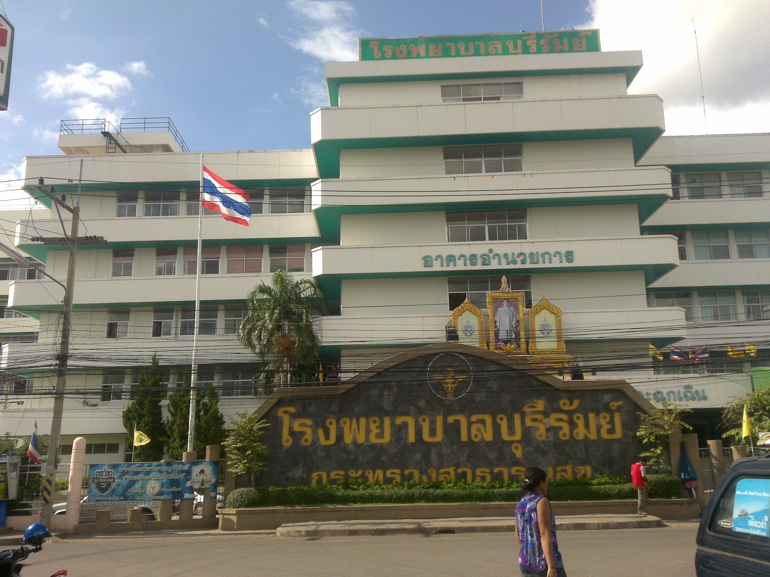 Buriram Hospital.